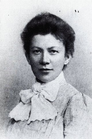 Anna Ul'janova-Elizarova (1864-1935), sorella di Lenin